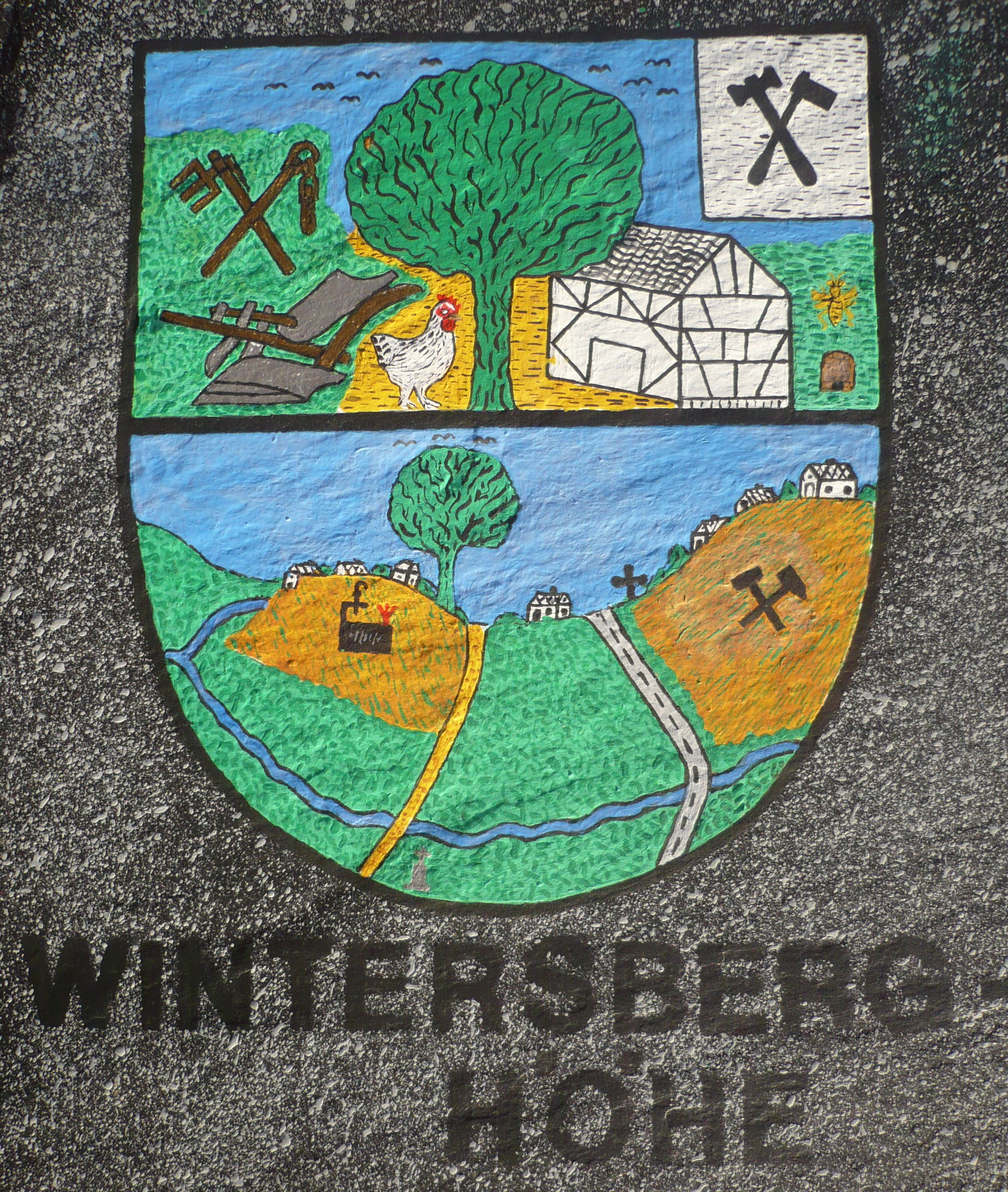 Schiefertafel als Ortswappen von Höhe und Wintersberg, erstellt von Richard Lenzgen